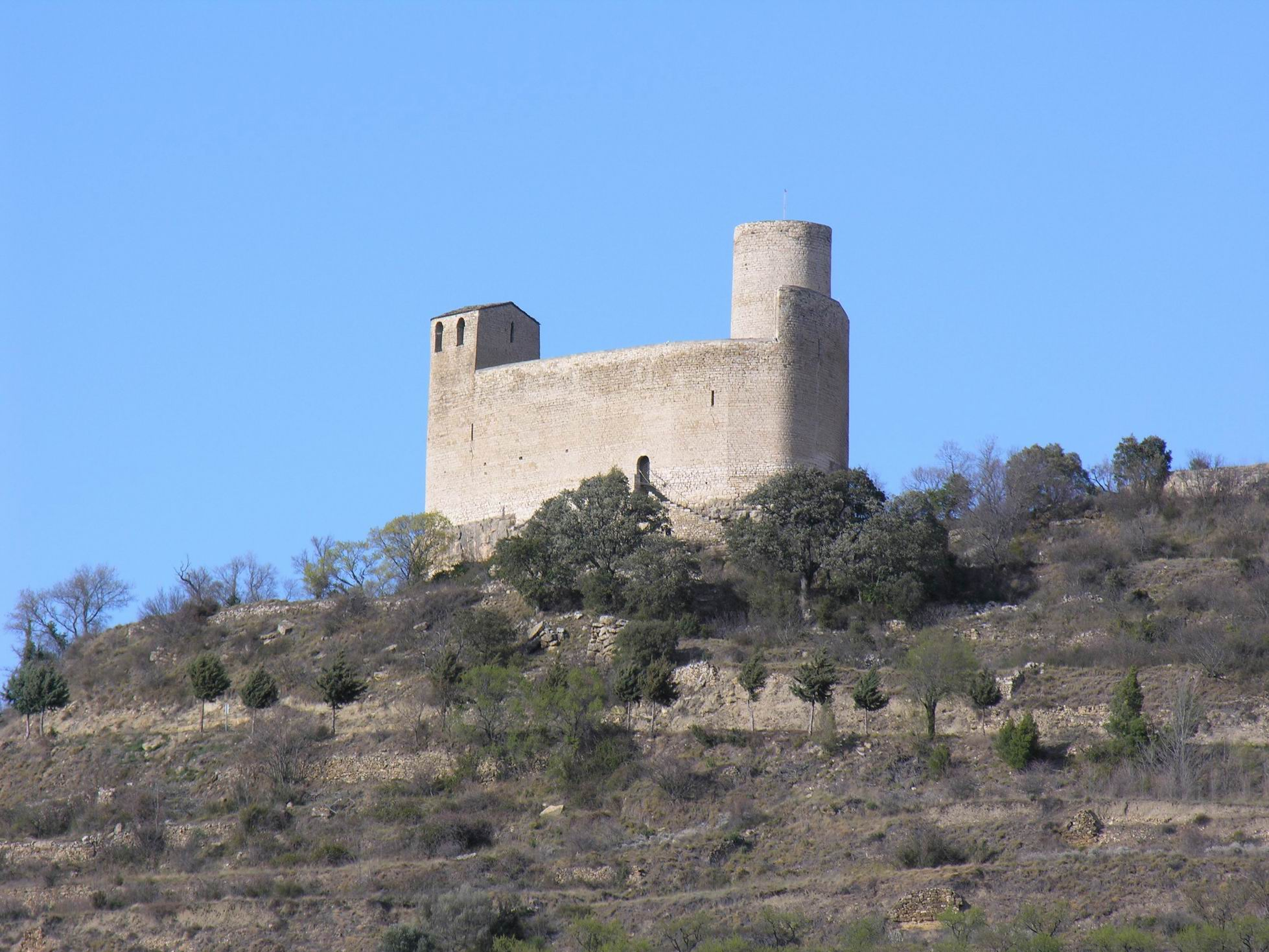 Castell de Mur (segle XI). Vista del castell de Mur. Castell de Mur, al Pallars Jussà.